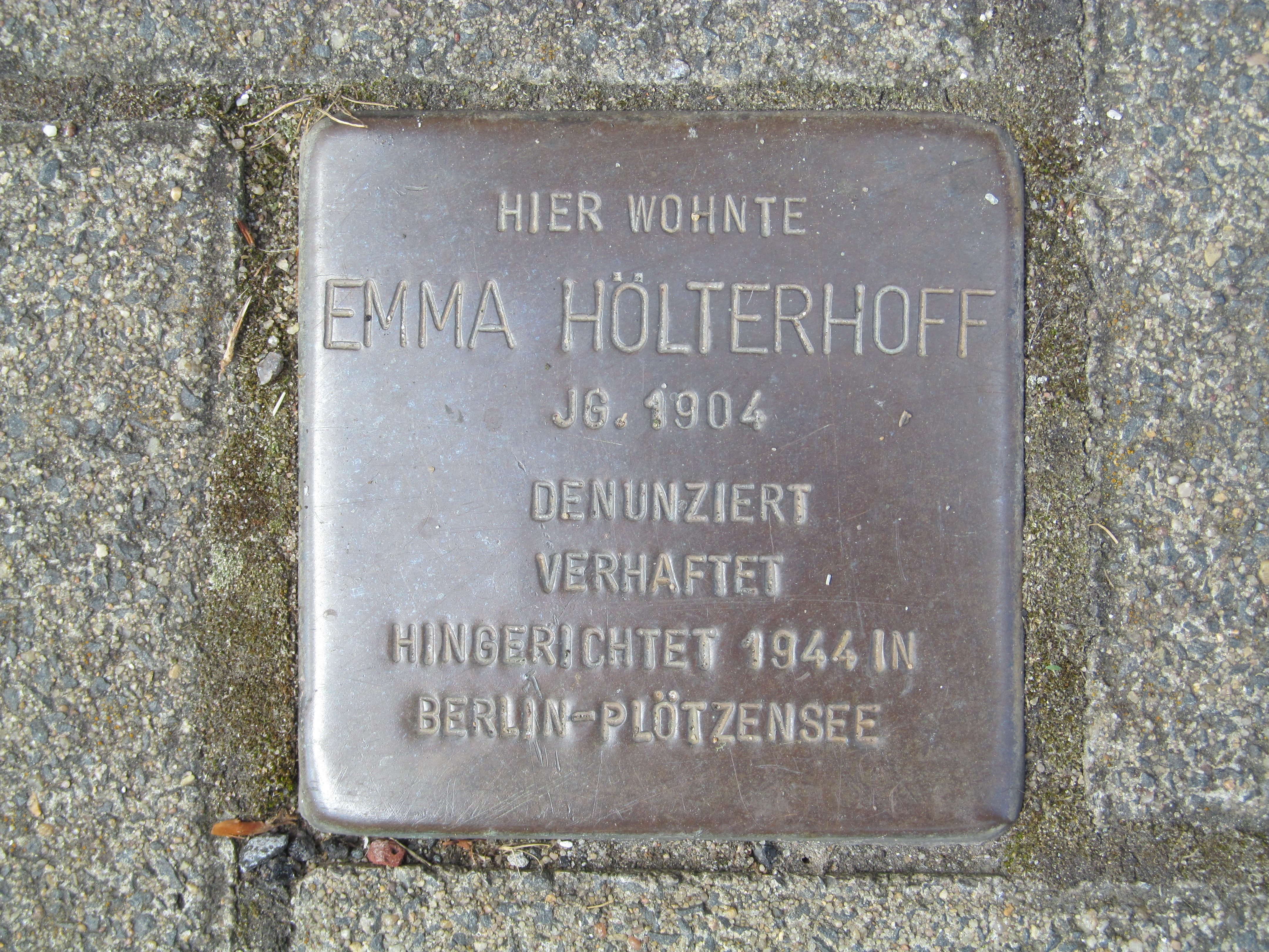 der Stolperstein für Emma Hölterhoff vor dem Haus Eisenbahnstraße 52 in Duisburg-Homberg